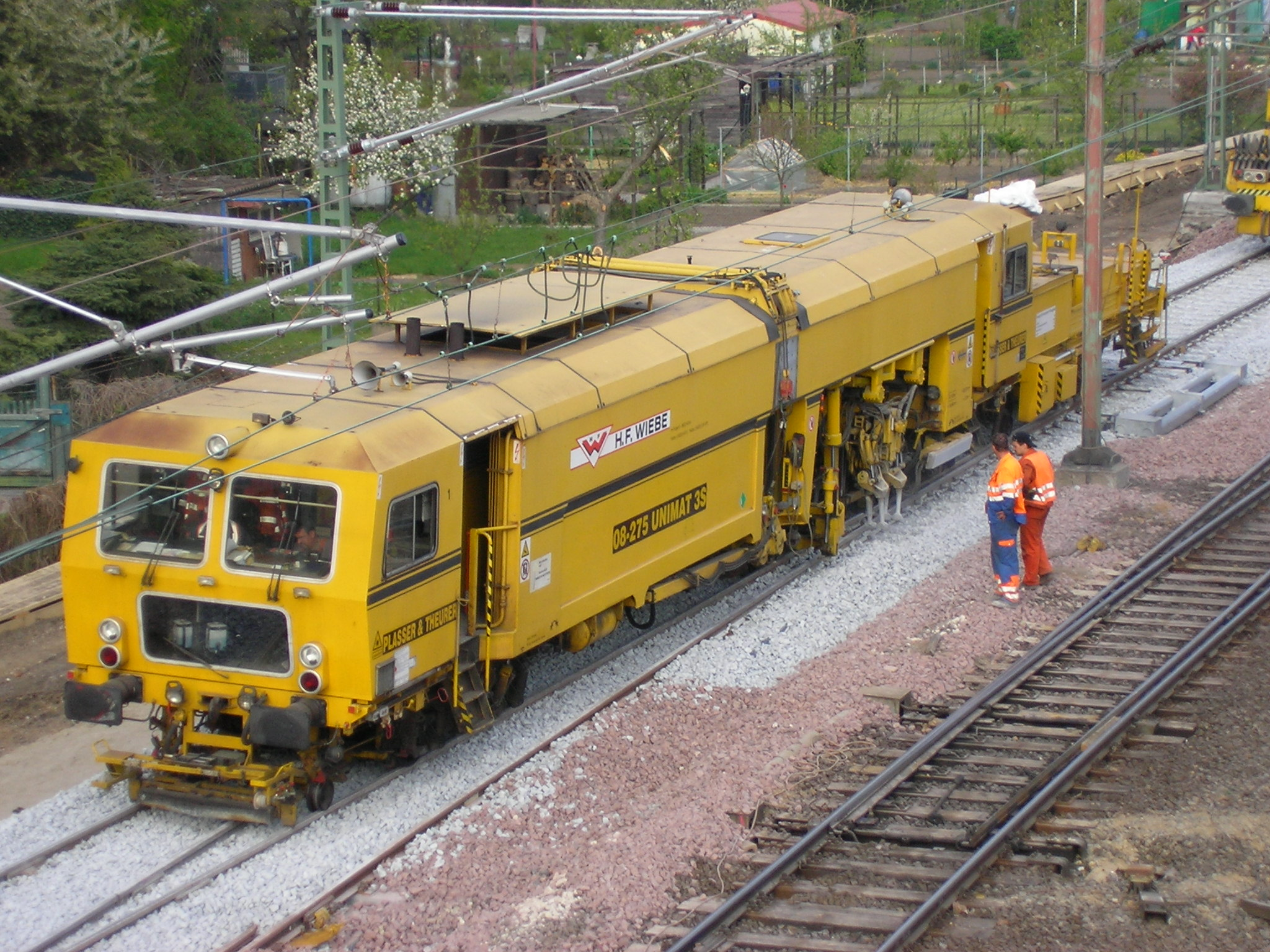 Stopfmaschine "08-275 UNIMAT 3S" der Gleisbaufirma "WIEBE" am 24.04.2005 auf dem Bahnhof Hildesheim.